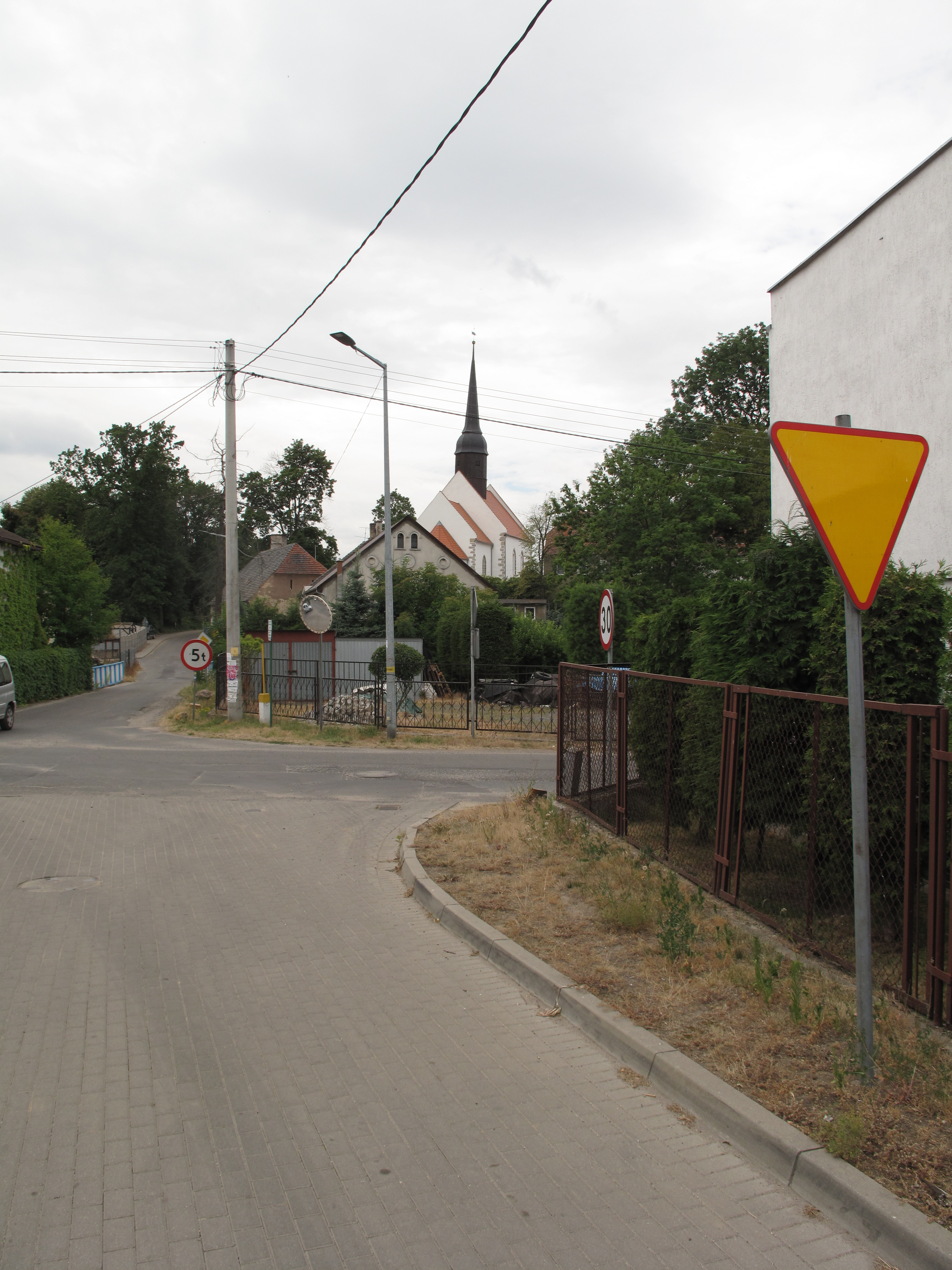 Jędrzychowice (powiat zgorzelecki). Polska.